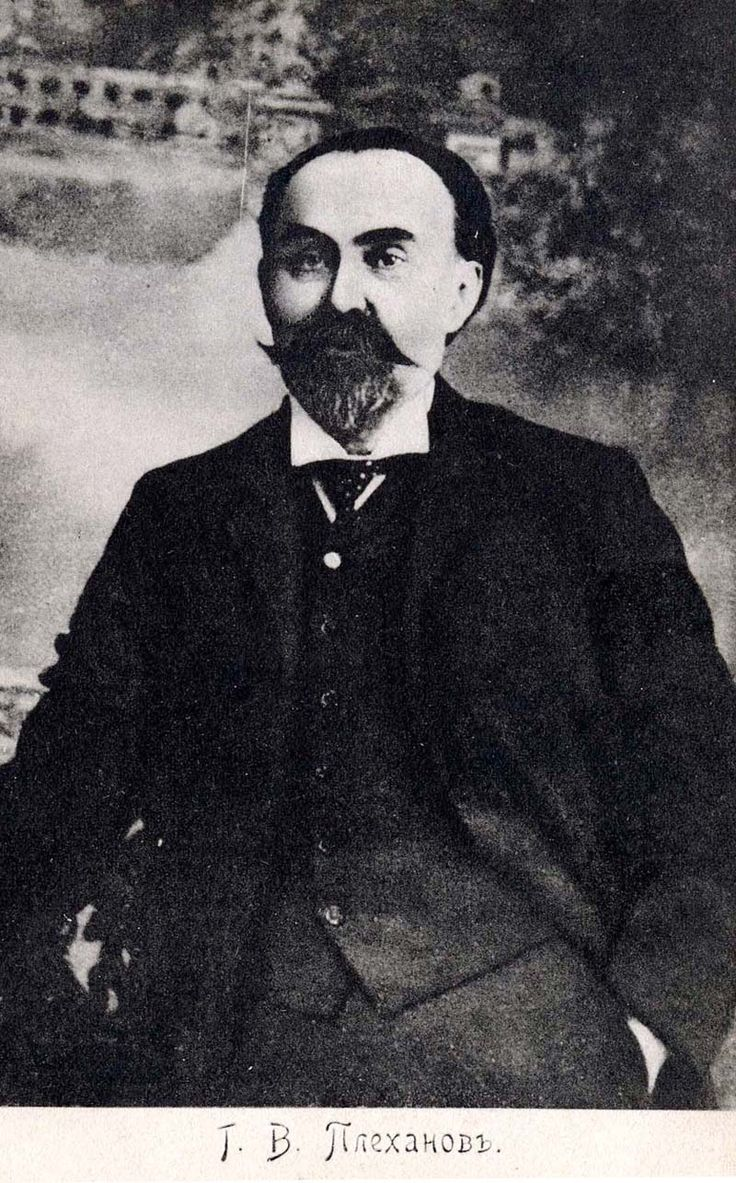 Русский революционер, философ-марксист Георгий Плеханов